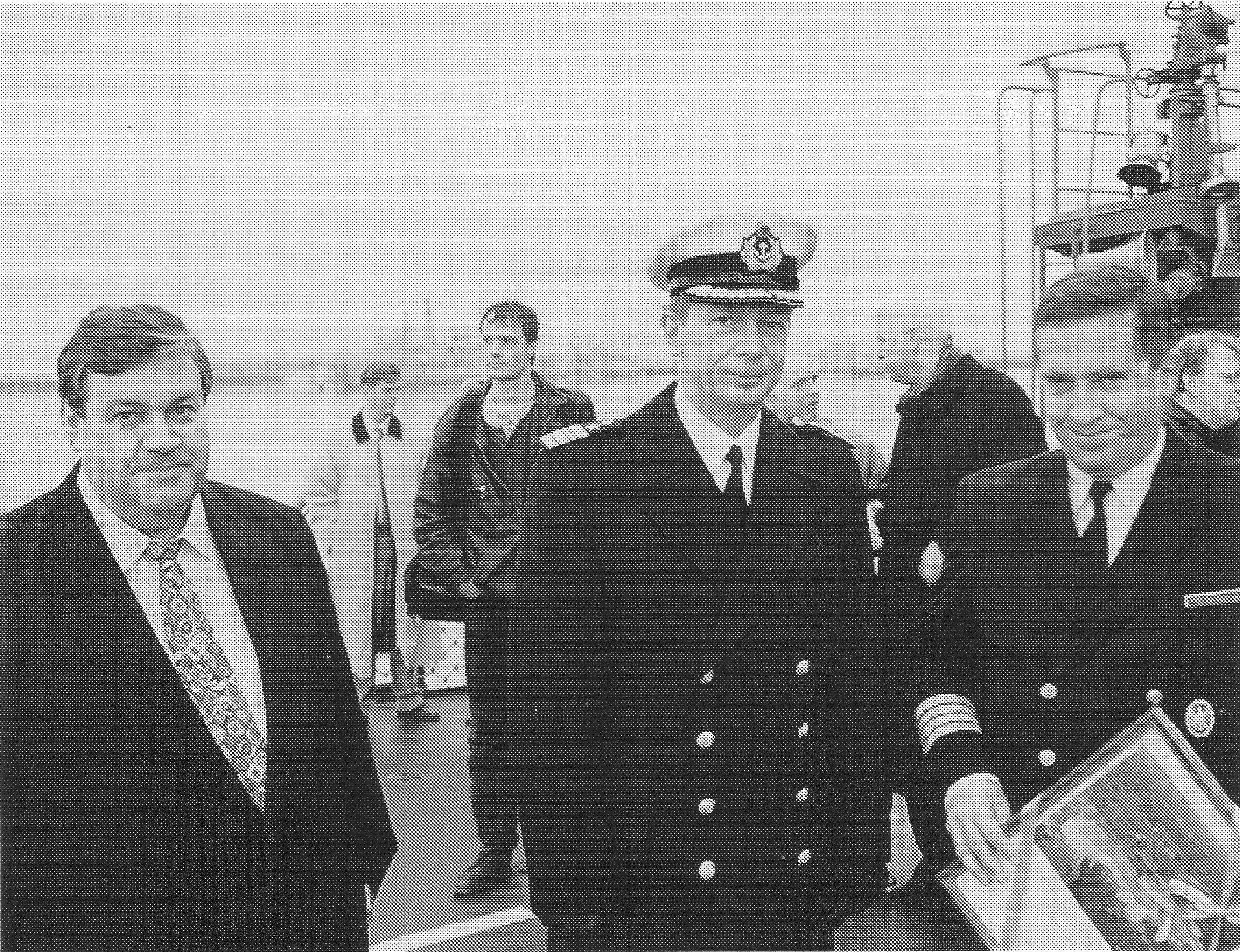 Übernahme der Patenschaft von Stadt und Klinikum Plau am See für den Sanitätsabschnitt der Fregatte Mecklenburg-Vorpommern bei der Indienststellung in Emden: Bürgermeister Hans-Heinrich Jarchow, Fregattenkapitän Martin Klüver und Rüdiger Döhler (l-r).